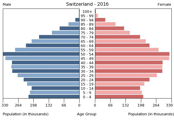 A population pyramid illustrates the age and sex structure of a country's population and may provide insights about political and social stability, as well as economic development. The population is distributed along the horizontal axis, with males shown on the left and females on the right. The male and female populations are broken down into 5-year age groups represented as horizontal bars along the vertical axis, with the youngest age groups at the bottom and the oldest at the top. The shape of the population pyramid gradually evolves over time based on fertility, mortality, and international migration trends.